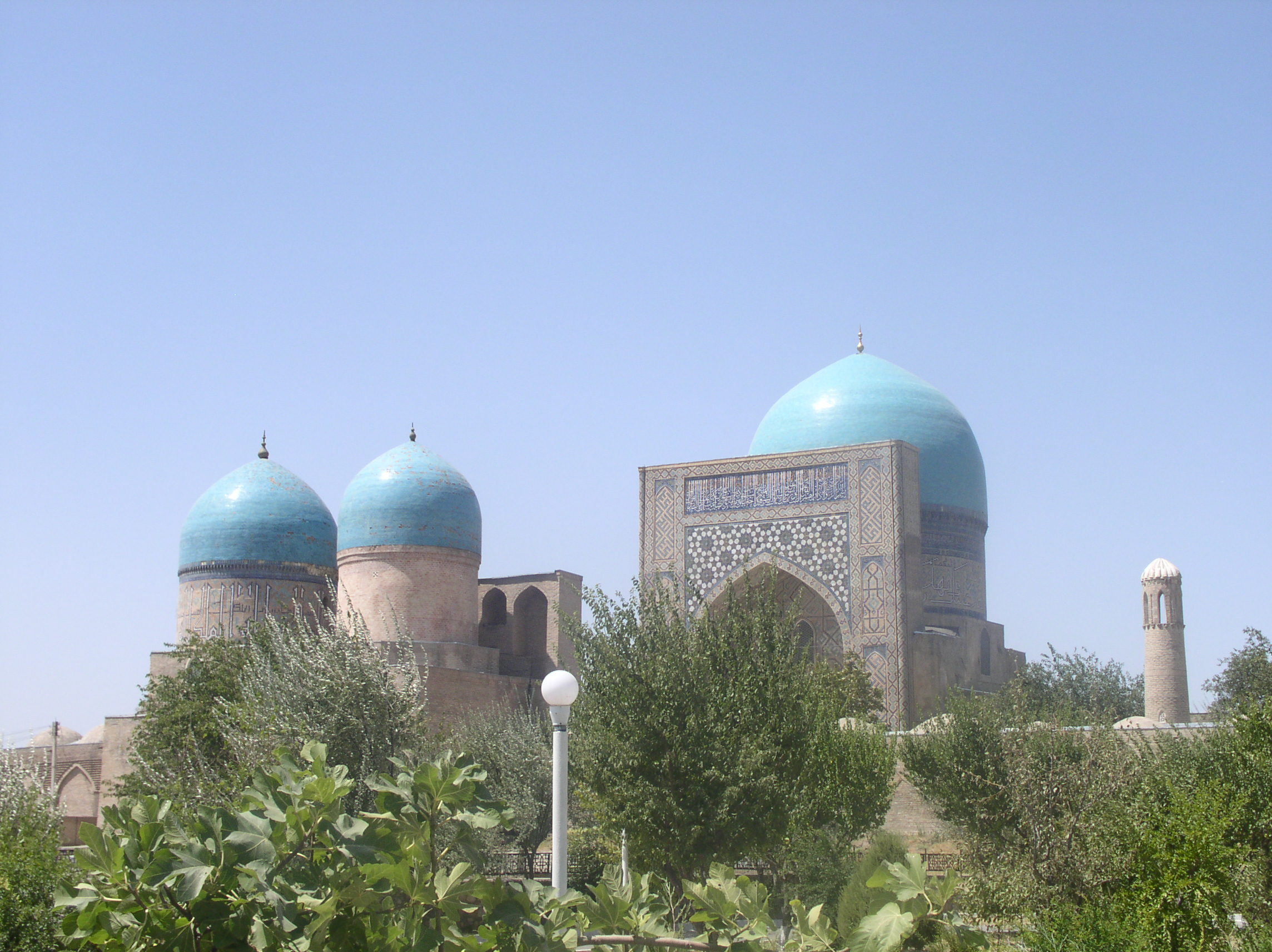 Kok-Gumbaz mosque in Shahrisabz, Uzbekistan